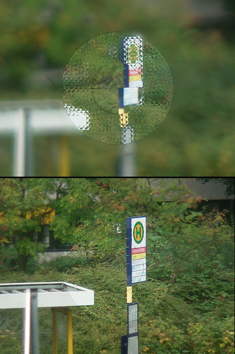 Schnittbildindikator und Mikroprismenring im Sucher einer Kleinbild-Spiegelreflexkamera (Minolta XD-7), Ausschnitt des gesamten Sucherbilds. Oben: Objektiv stark defokussiert, unten scharf eingestellt.